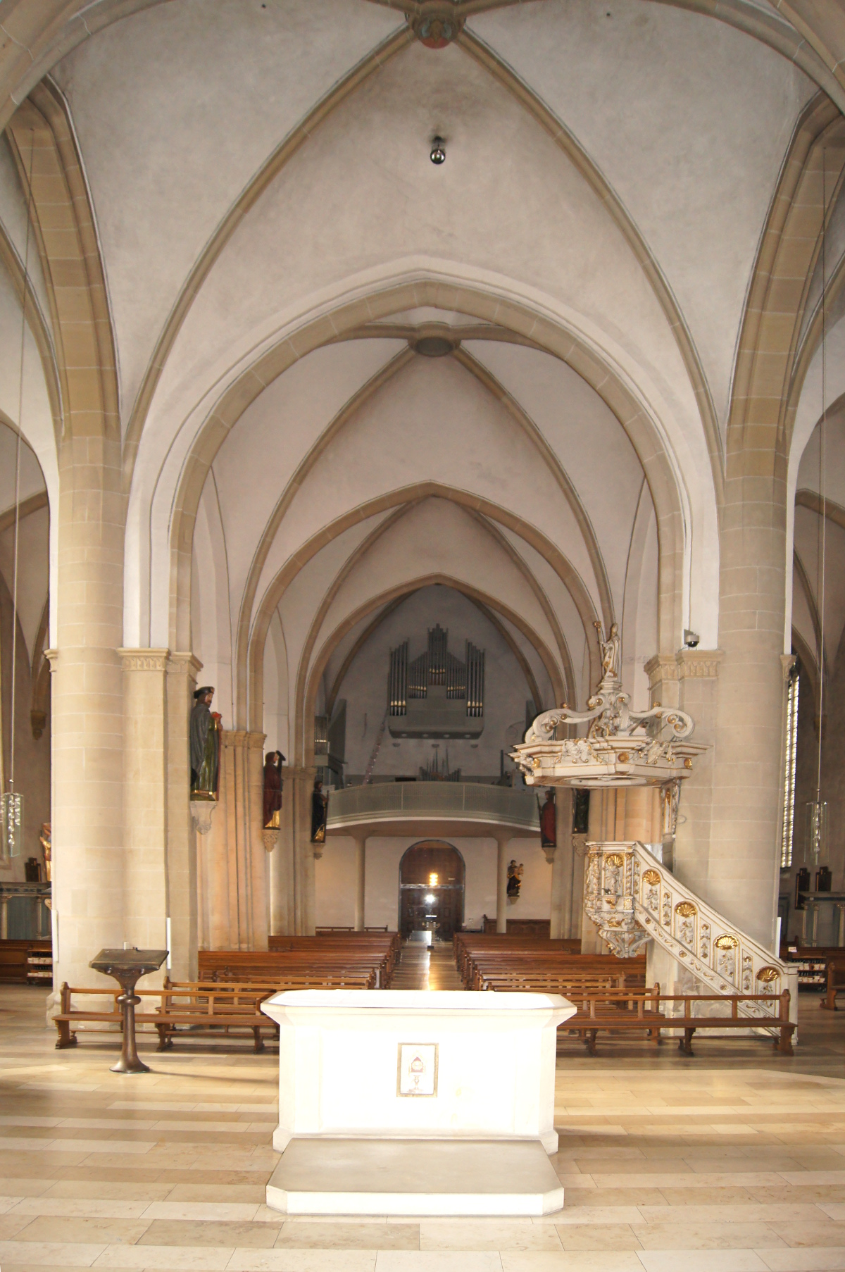 Mittelschiff der Coesfelder Lambertikirche. Blickrichtung vom Chor mit dem Altar im Vordergrund nach Westen. Standort unter dem Coesfelder Kreuz.